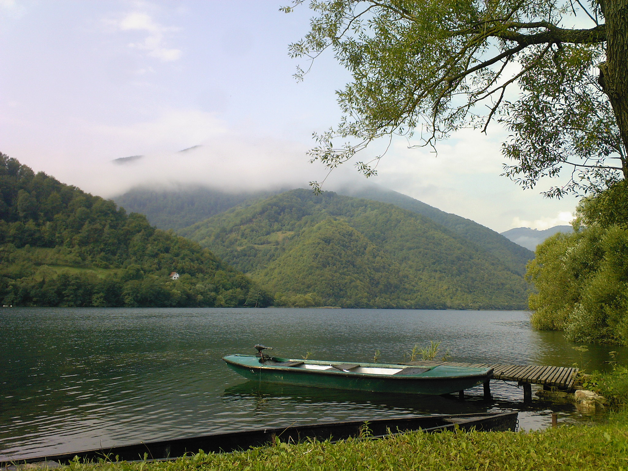 Pliva Lakes